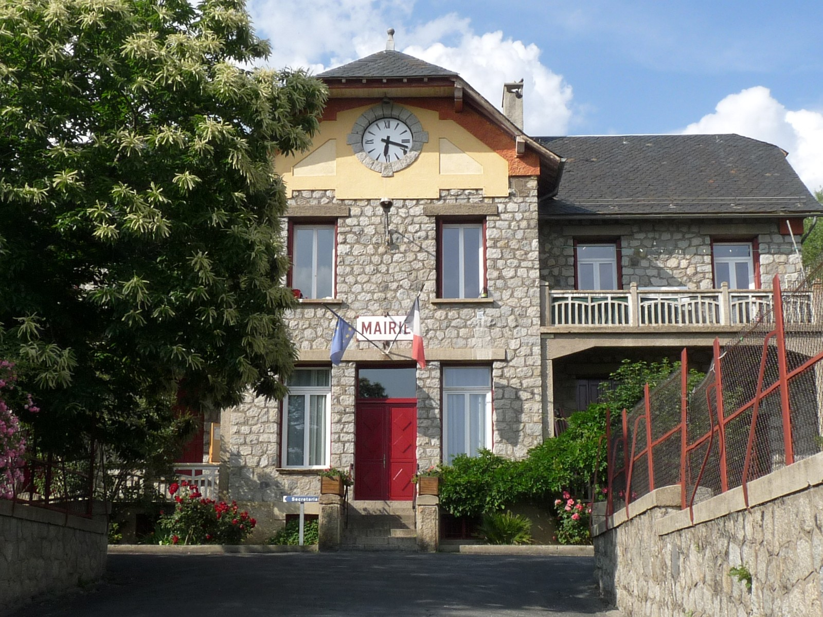 Mairie d'Enveitg, Pyrénées-Orientales, France